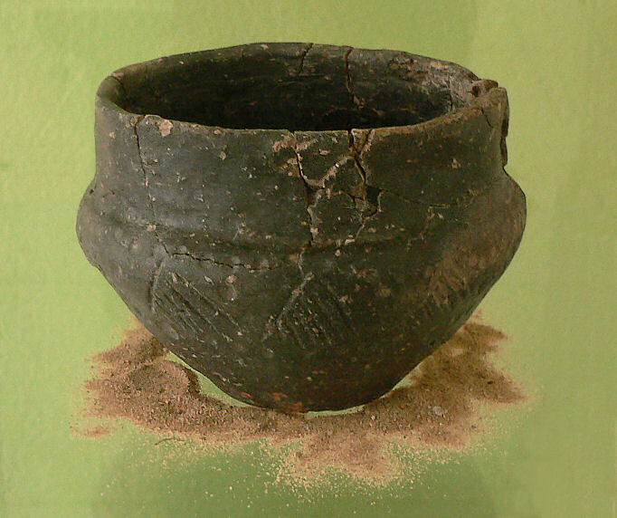 Nienburger Tasse als Fund bei der Ausgrabung im Jahre 2011 der eisenzeitlichen Siedlung bei Bantorf, ausgestellt in einer Ausstellung im Rathaus Barsinghausen im September 2012